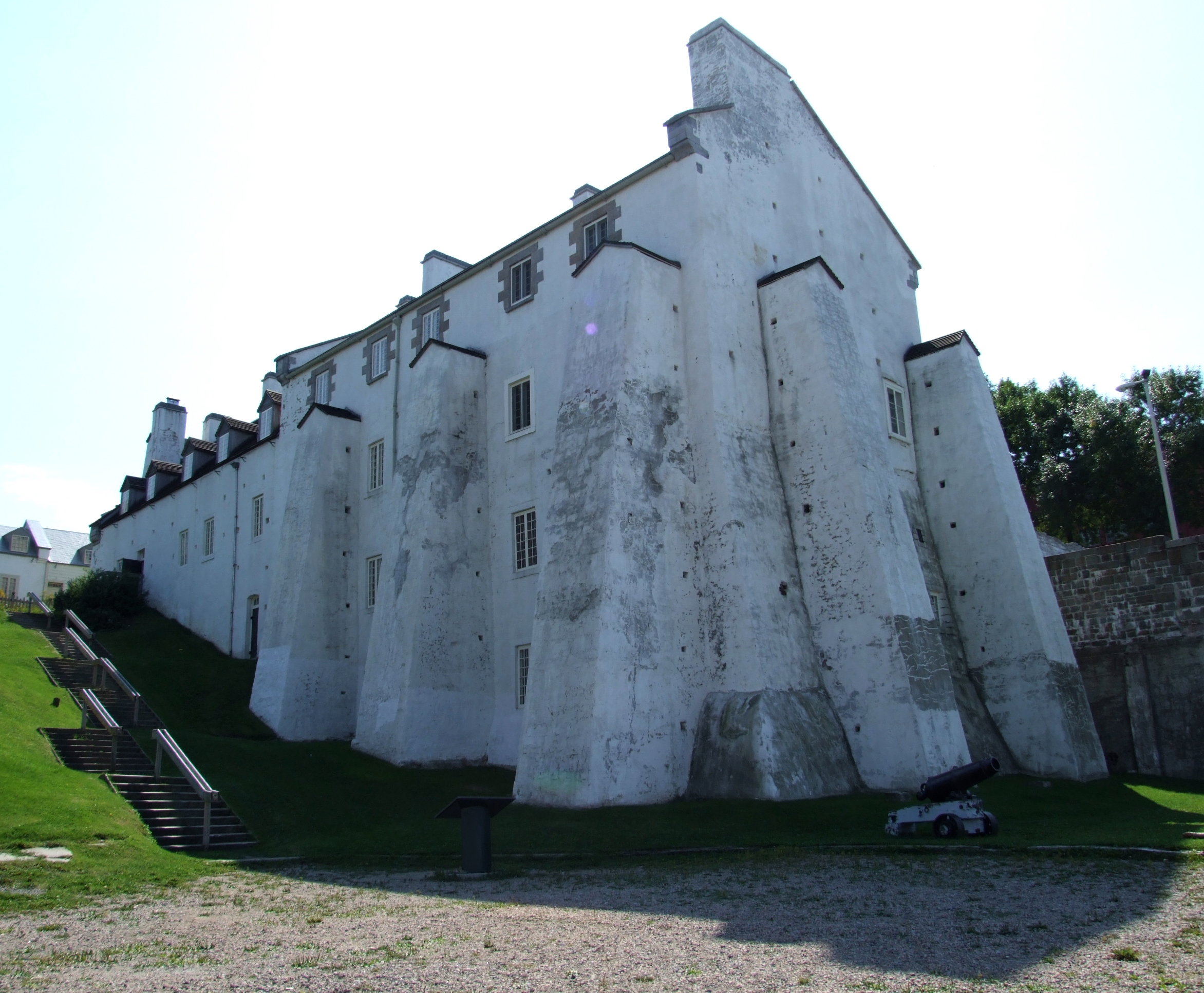 Redoute Dauphine, ville de Québec, CANADA